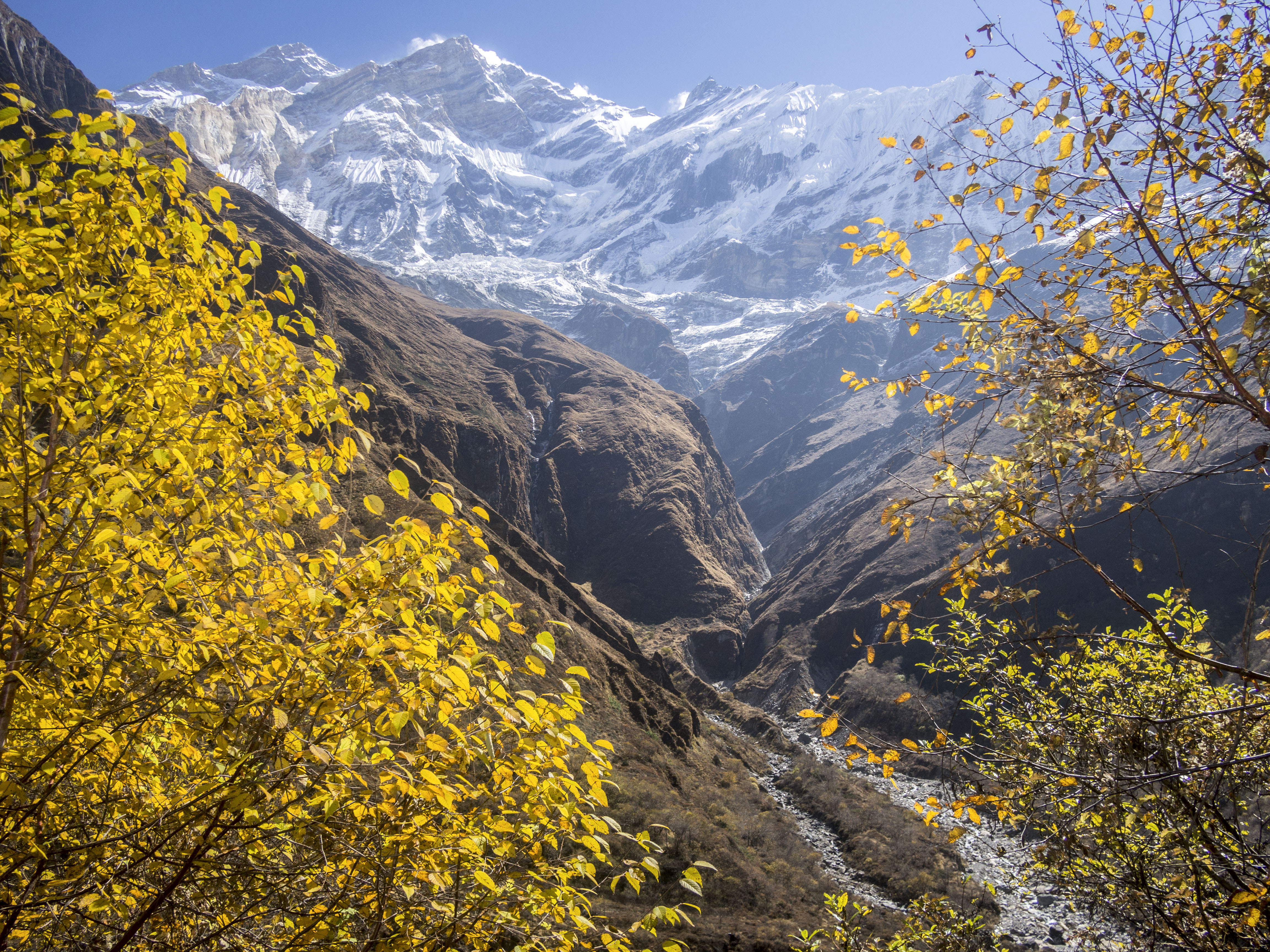 Mt.Annapurna, Miristi Khola valley